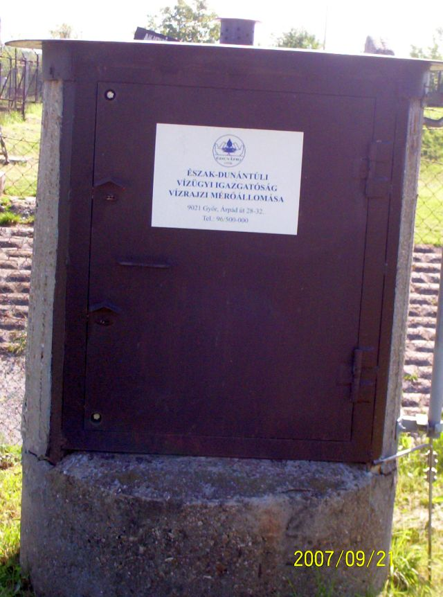 Vízmérőállomás a Galla-pataknál (Tatabánya)